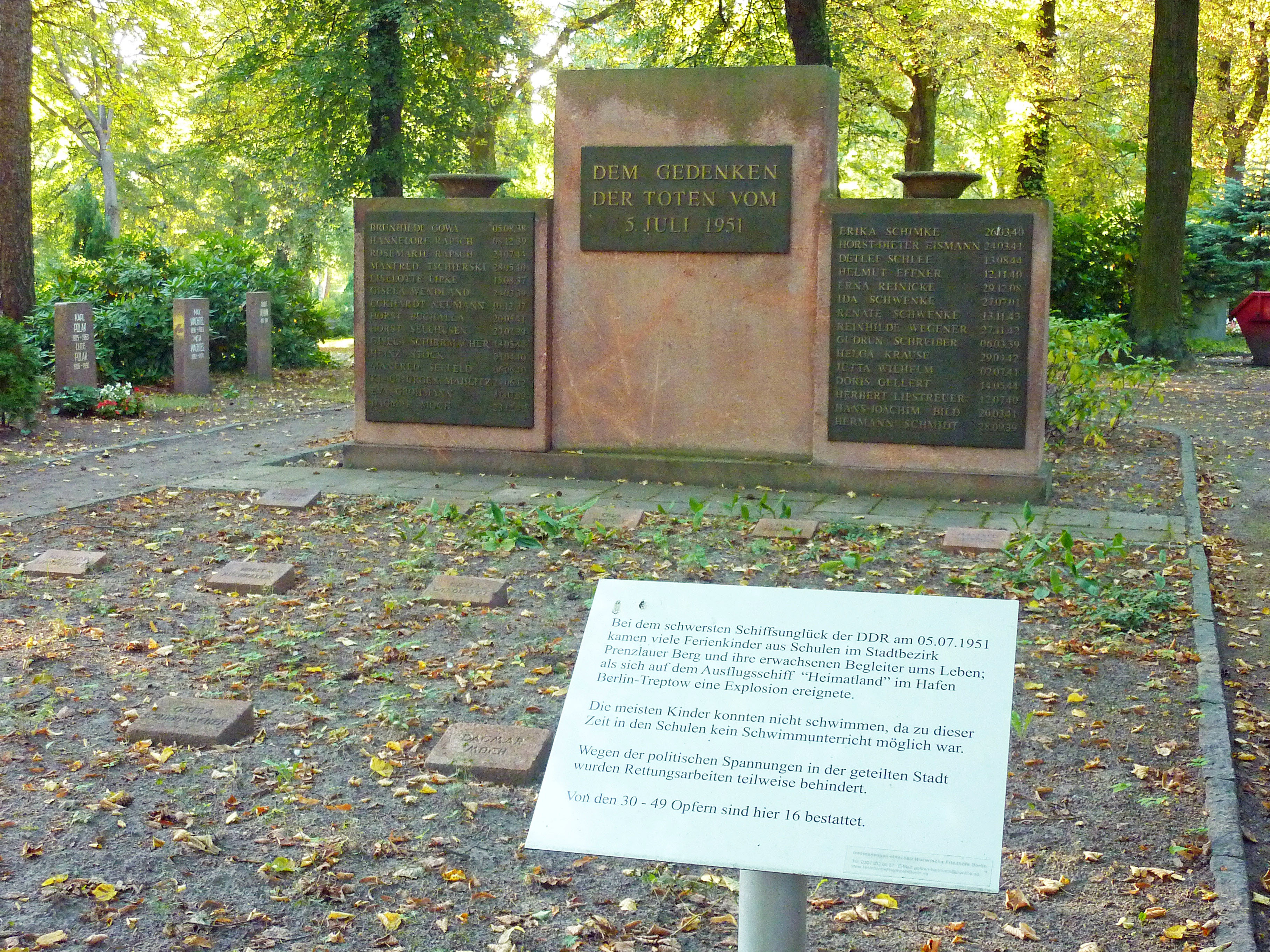 Grab- und Gedenkanlage auf dem Zentralfriedhof Friedrichsfelde in Berlin-Lichtenberg für 30 Todesopfer des Schiffsunglücks vom 5. Juli 1951 auf dem Passagierschiff 'Heimatland'. Die 16 Grabkissen wurden im Jahr 2011 restauriert. Im selben Jahr wurde die Informationstafel enthüllt. [1]